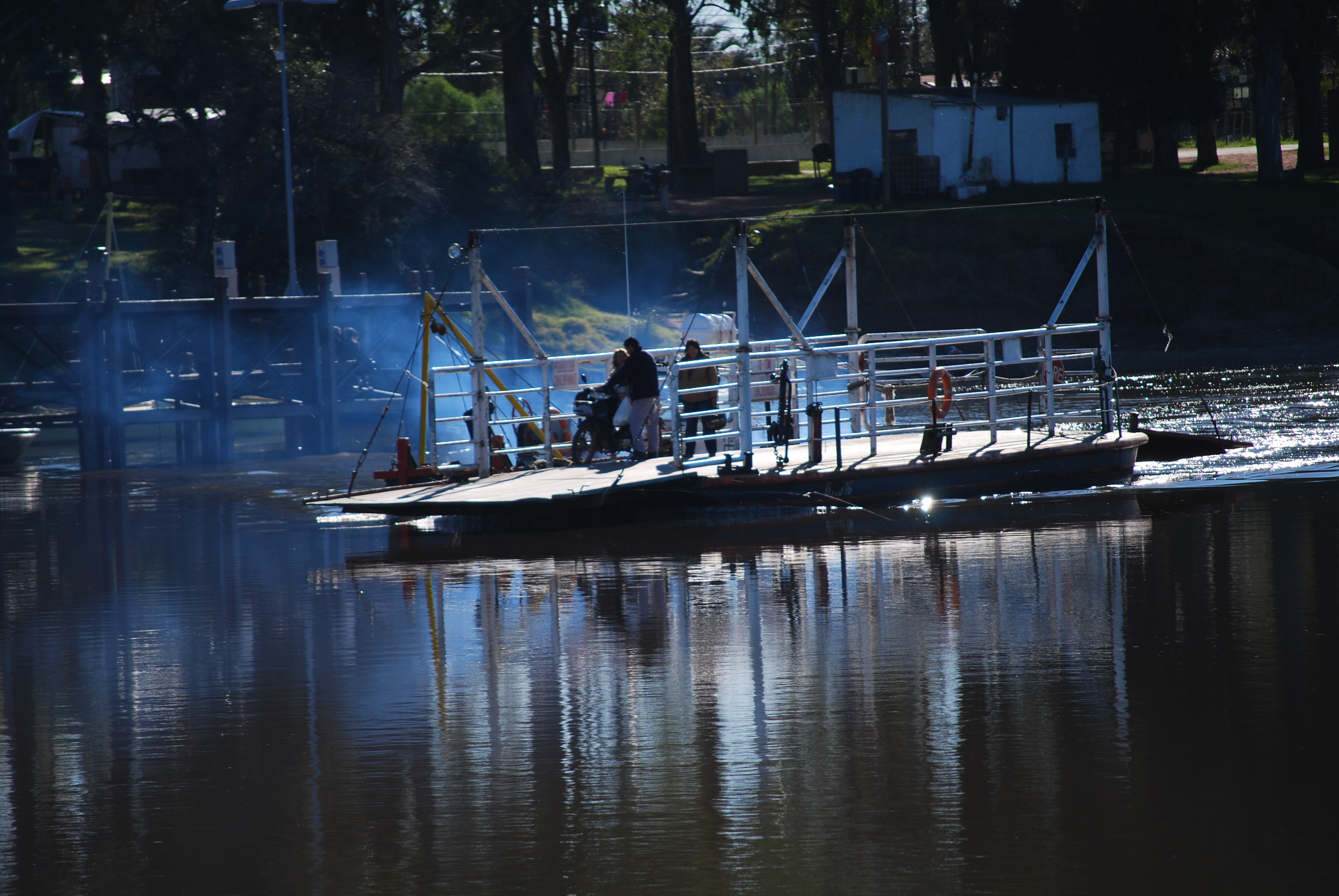 Balsa que une La Charqueada y el Pueblo Cebollatí (Uruguay)